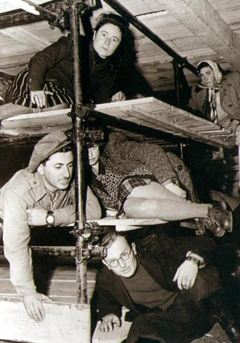 אוניית המעפילים לא תפחידונו - מעפילים